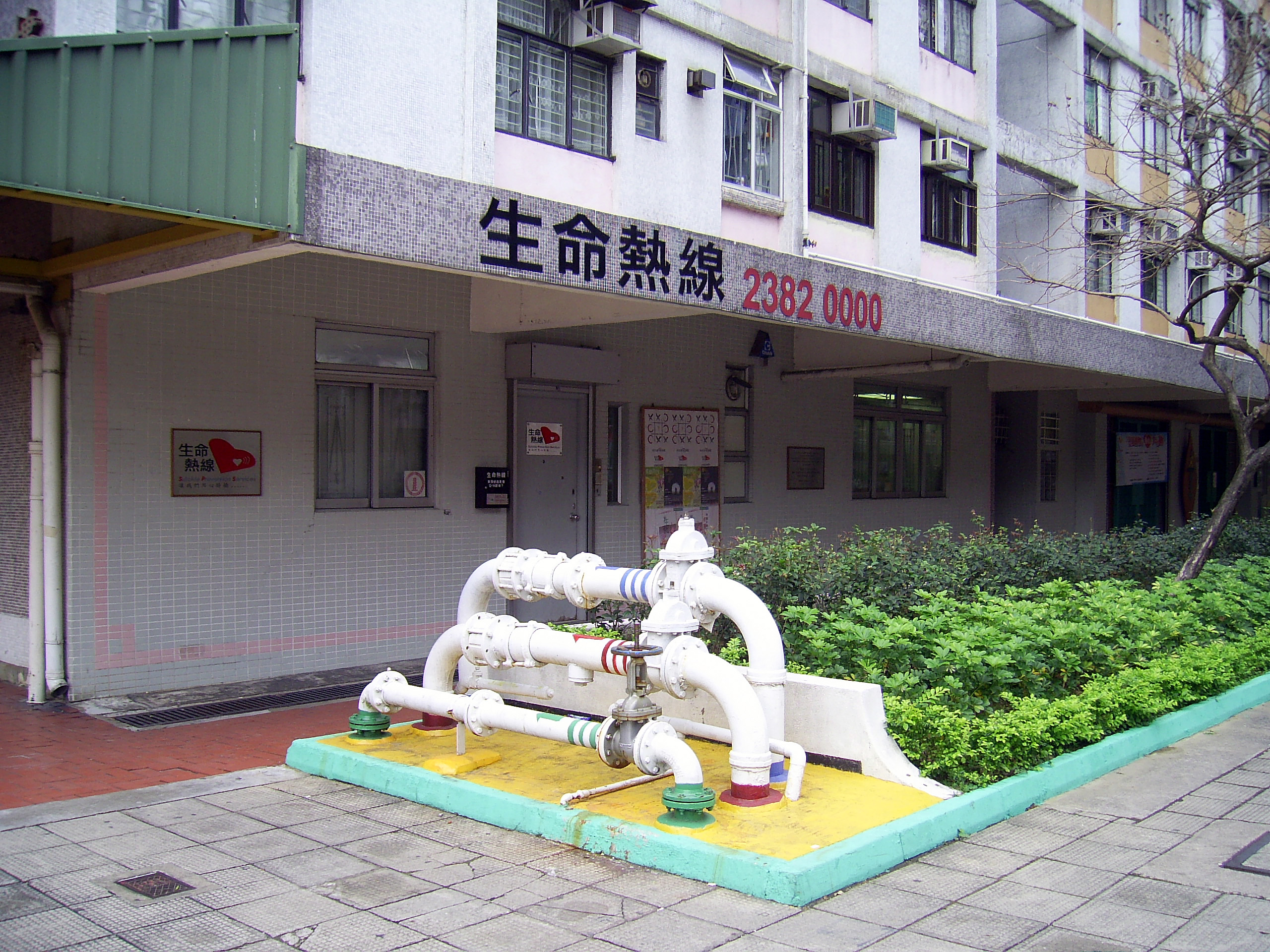 中文（香港）: 生命熱線位於東頭邨的會址